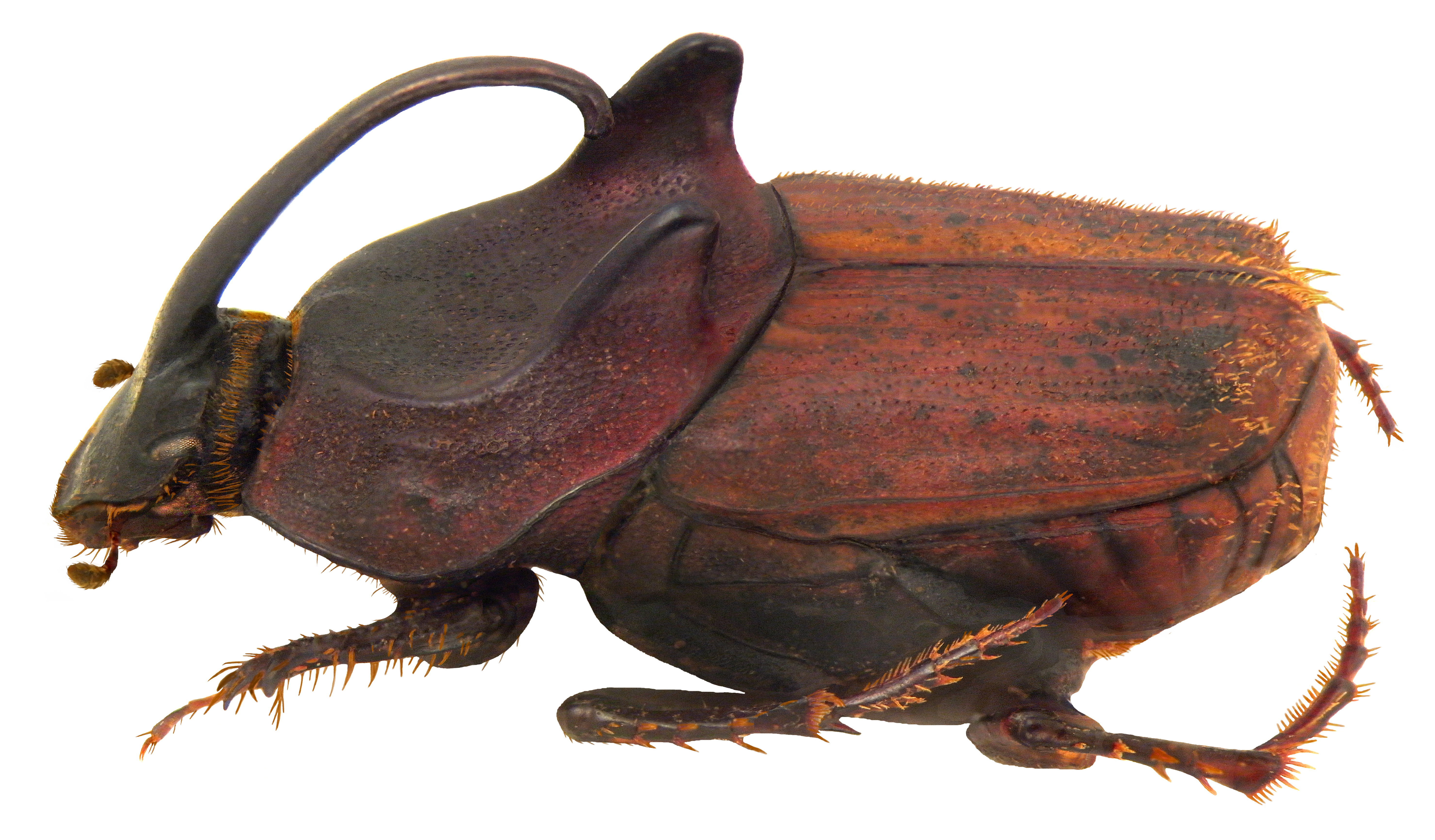 Familie: Scarabaeidae Groesse: 10 mm Fundort: China, Yunnan, Lijiang leg. L. & M. Bocák, 1990; det. J.Scheuern, 1994 Photo: U.Schmidt, 2010